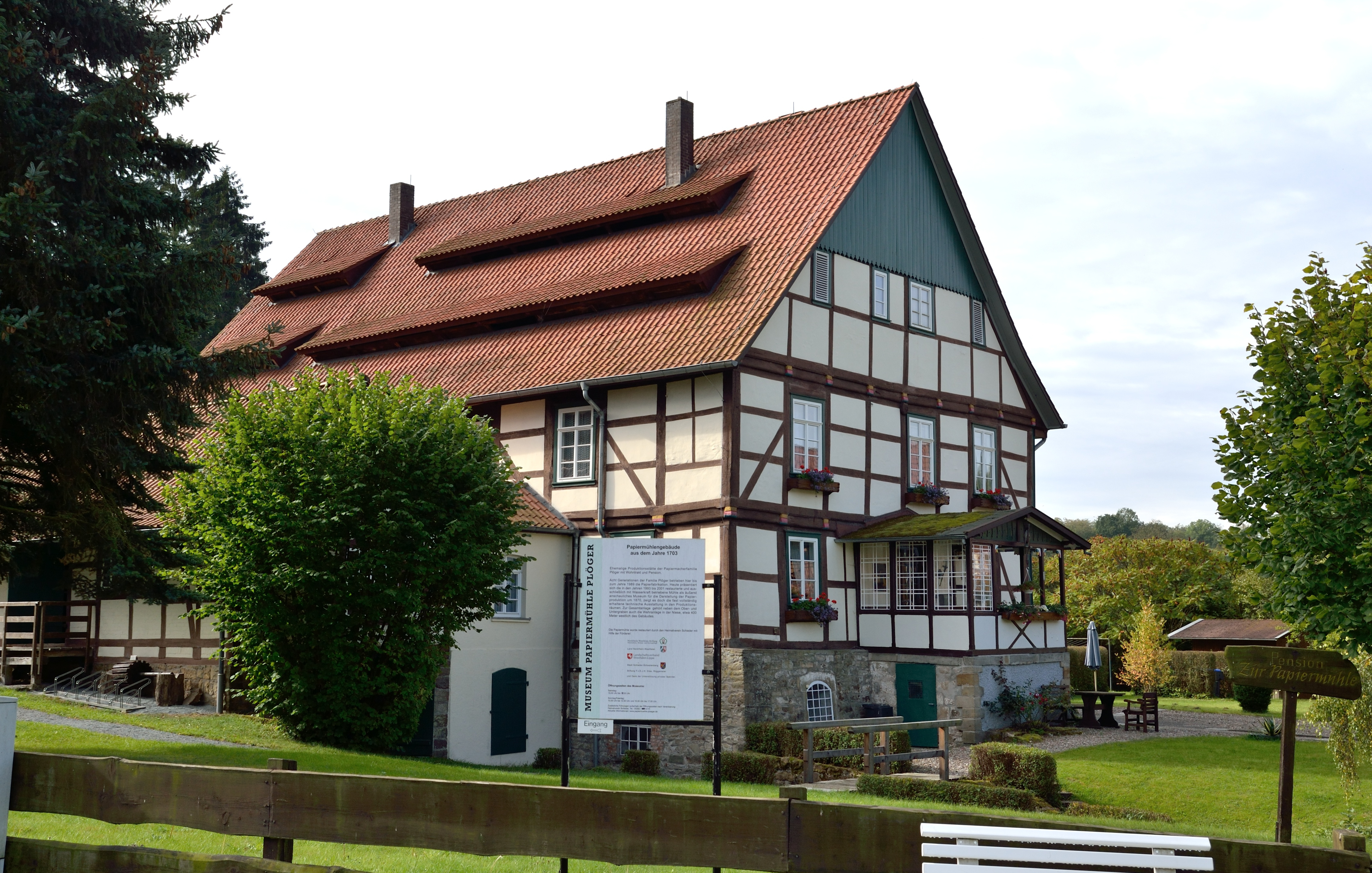 This is a photograph of an architectural monument. Papiermühle Plöger